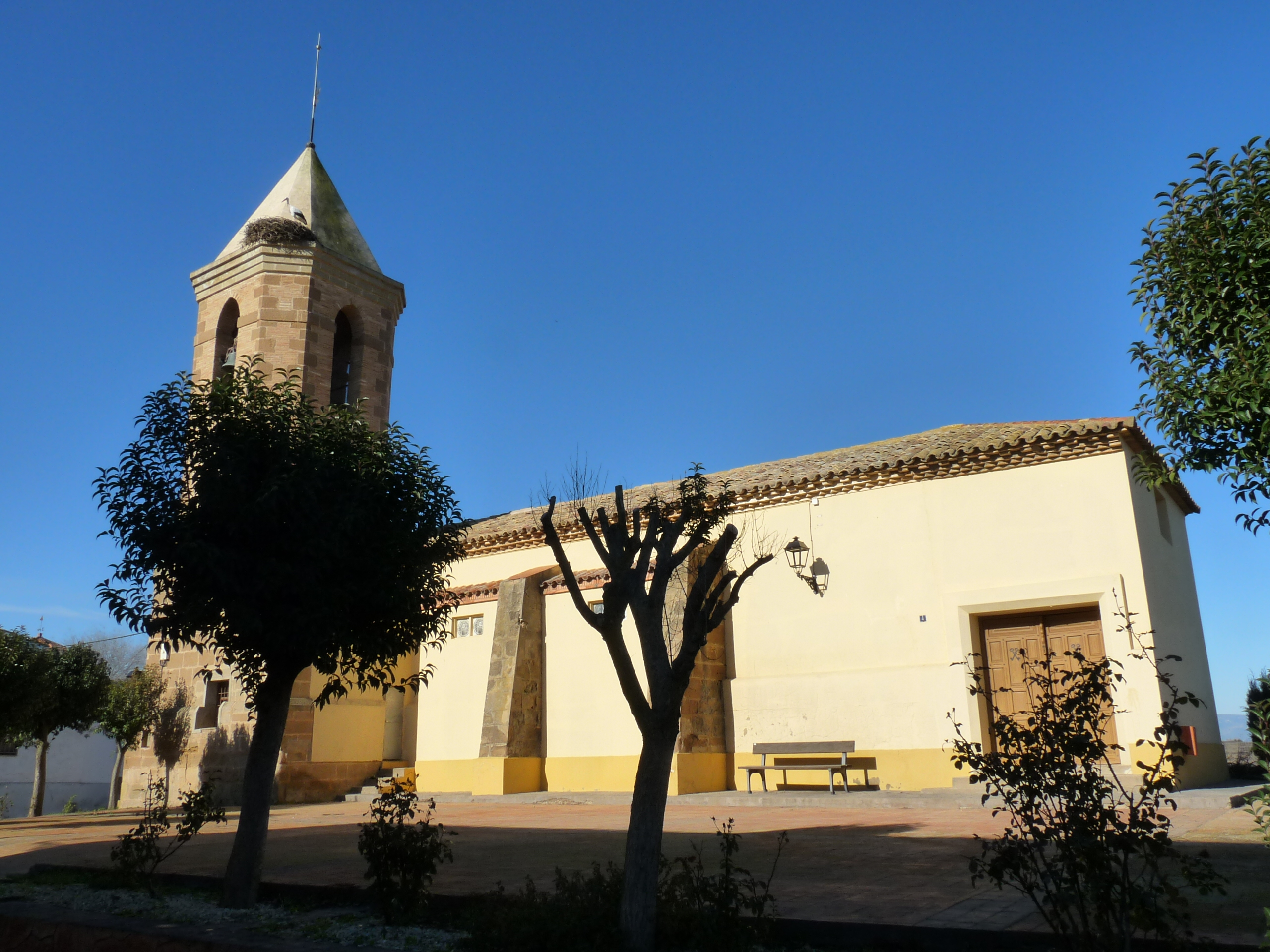 Torres de Barbués - Iglesia de San Pedro (s. XVII)